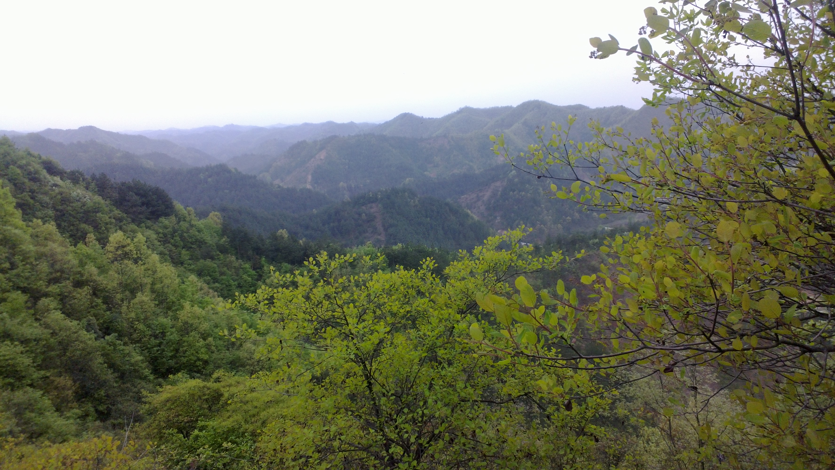 中文（台灣）: P-43戰鬥機在中國的空戰，日軍戰機墜落點，周圍的自然環境。（2015年4月3日拍攝）